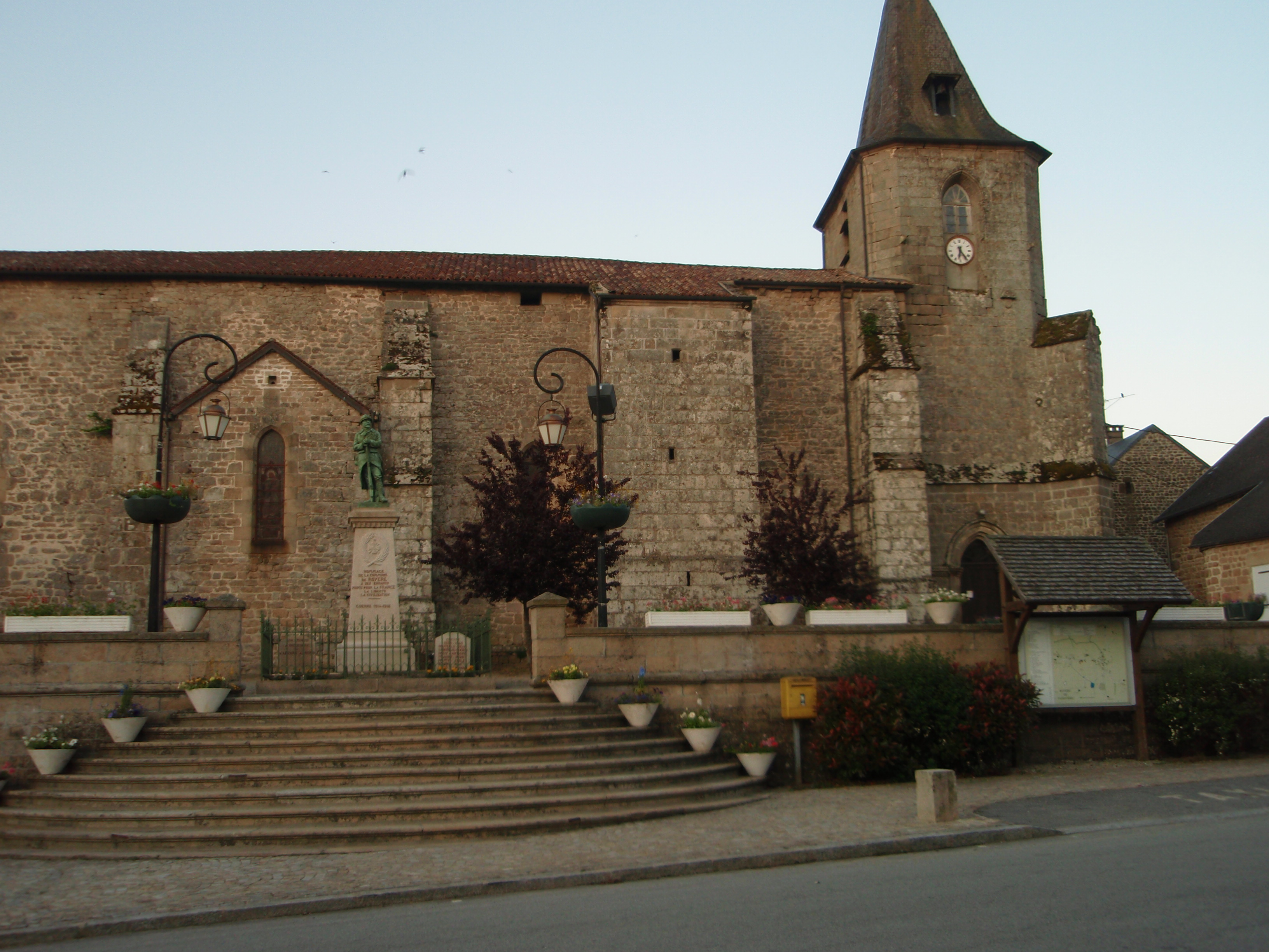 Royère de Vassivière Église Saint-Germain vue depuis la place de la Mayade.